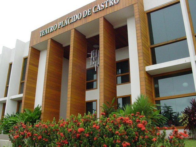 Rio Branco - Acre